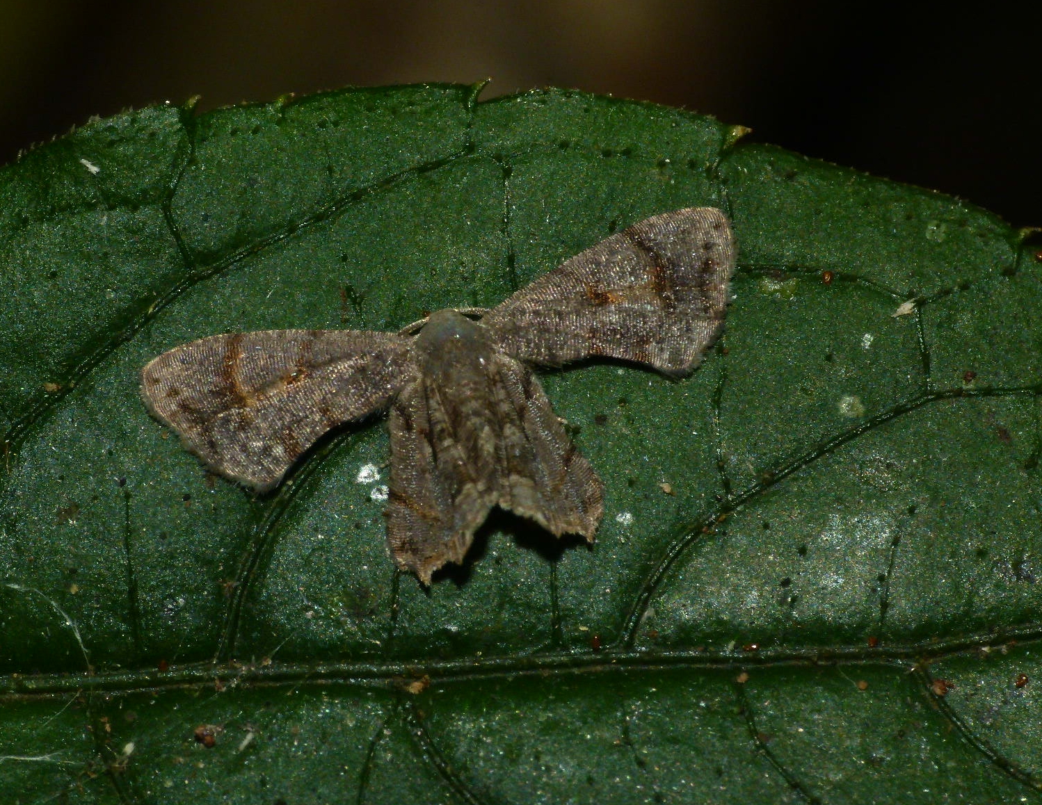 Dysaethria sp., Epipleminae (from Wynaad)